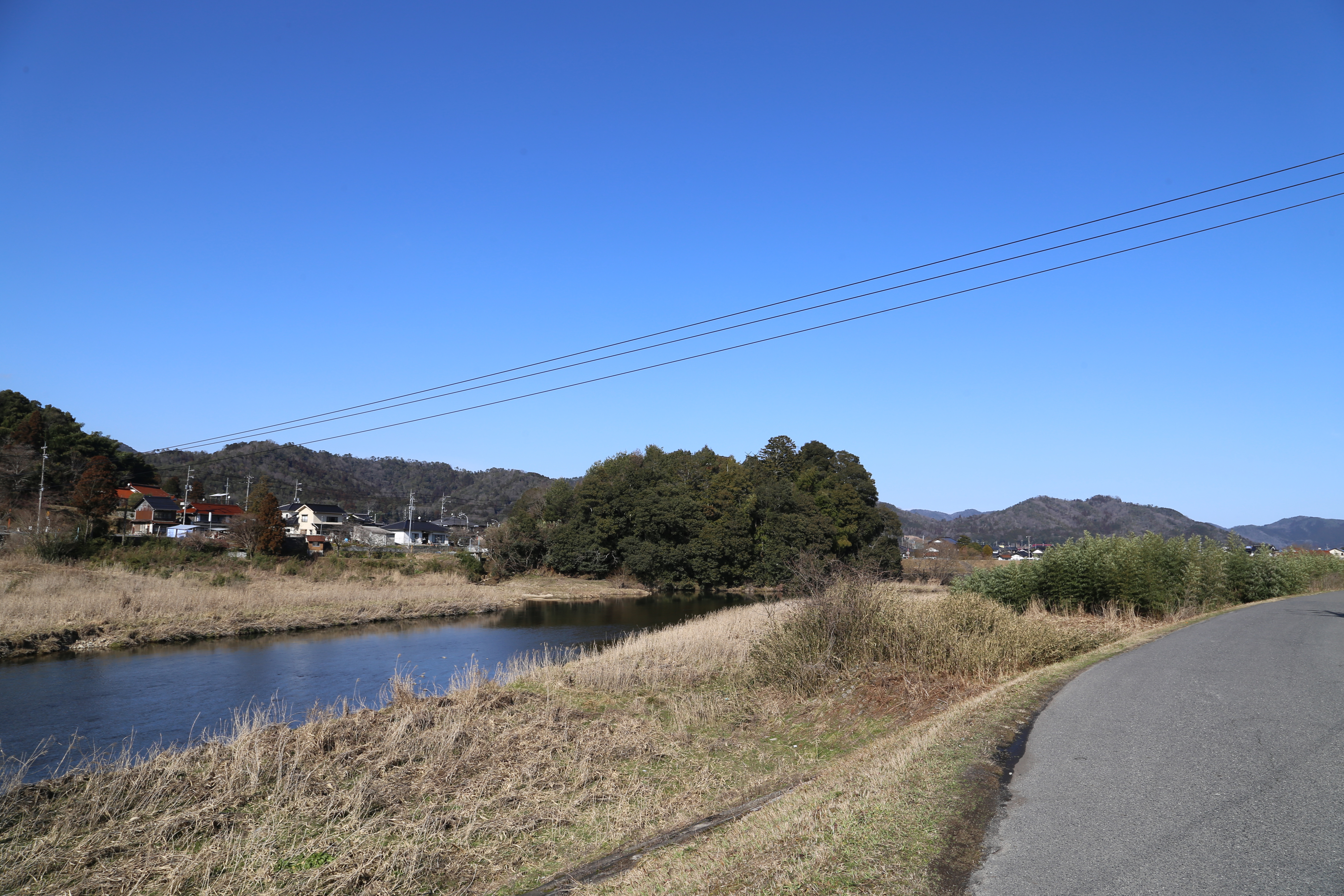 安芸国宮の城（現・埃ノ宮神社）